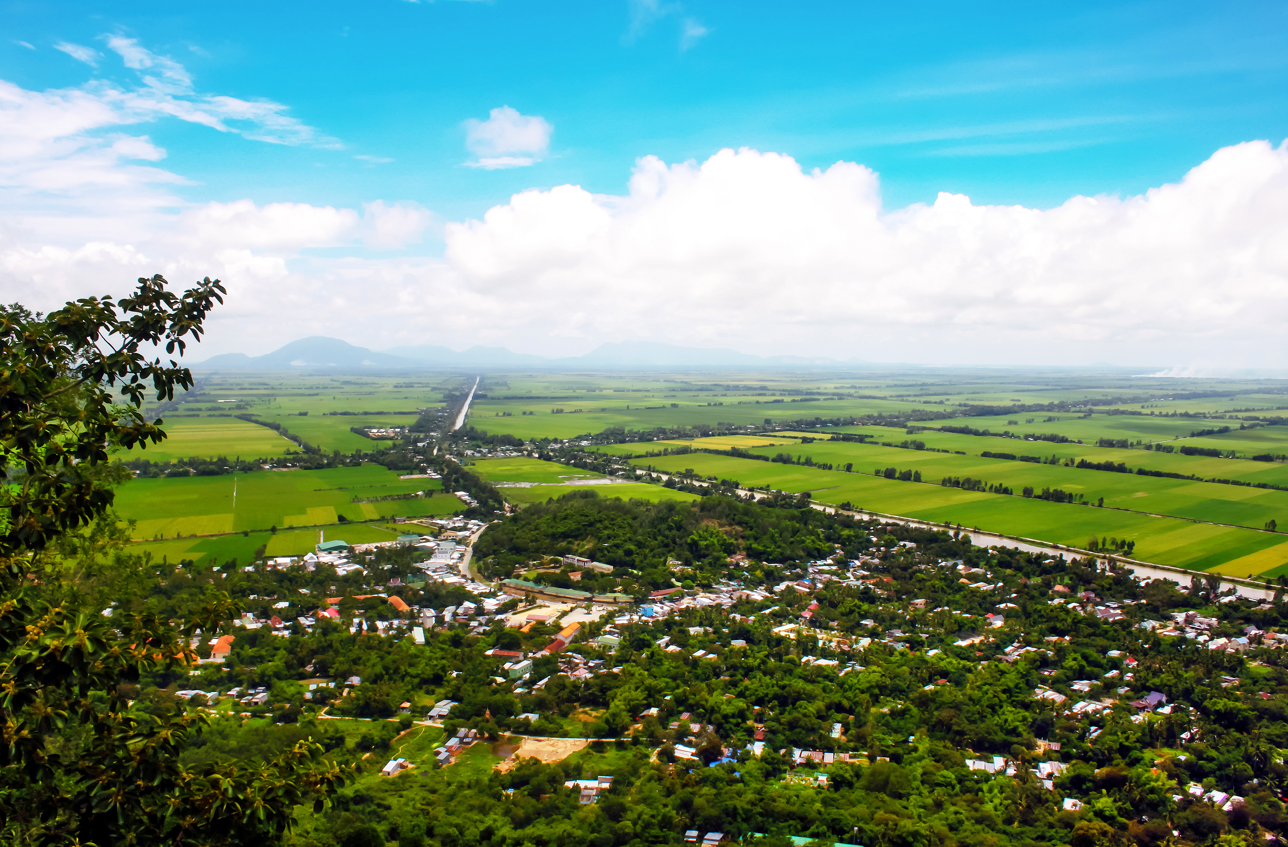 Từ trên đỉnh núi Ba Thê (chót Ông Tà) nhìn xuống chân núi, thấy một phần thị trấn Óc Eo, thuộc huyện Thoại Sơn, An Giang, Việt Nam.